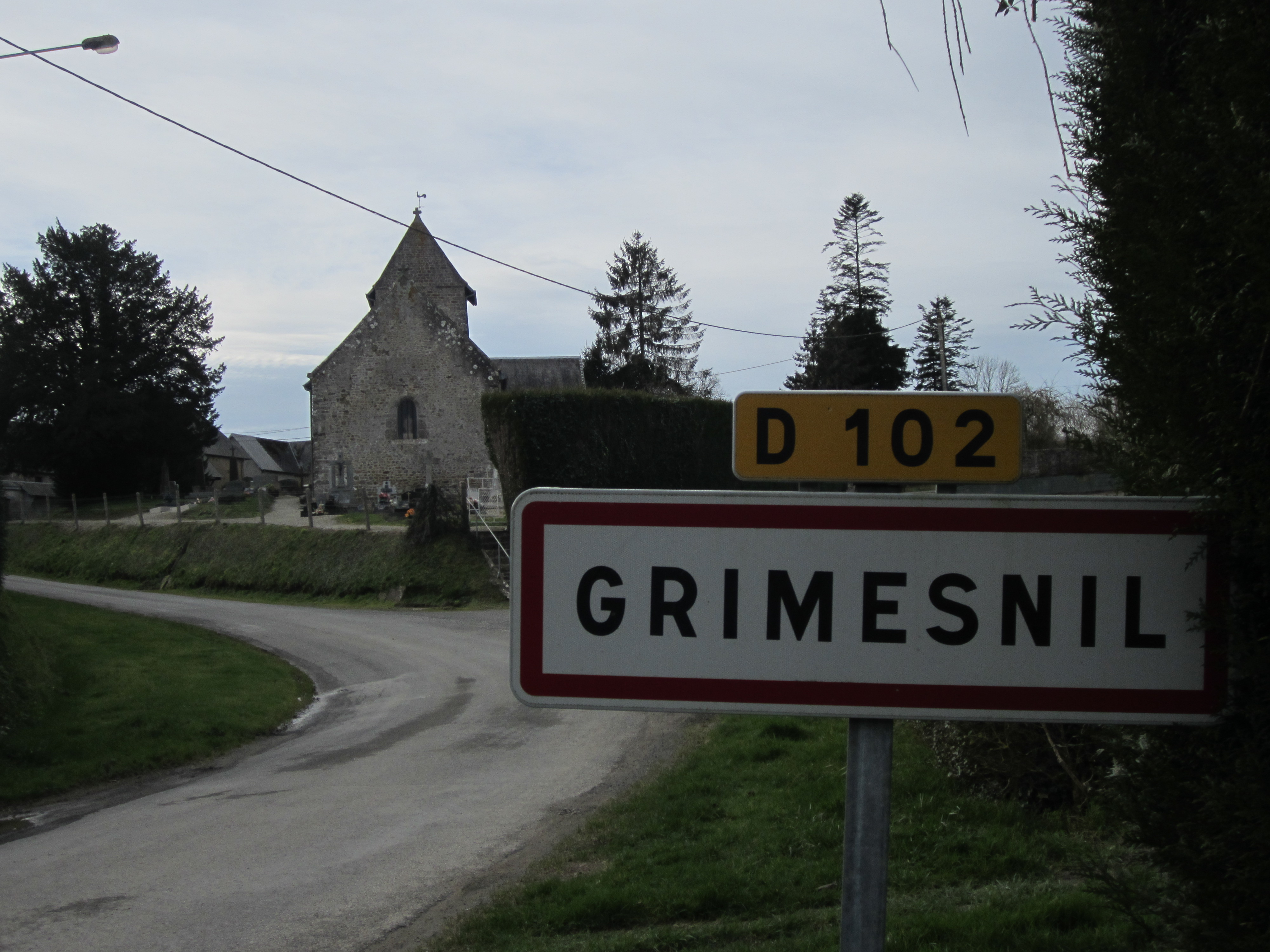 Grimesnil, Manche